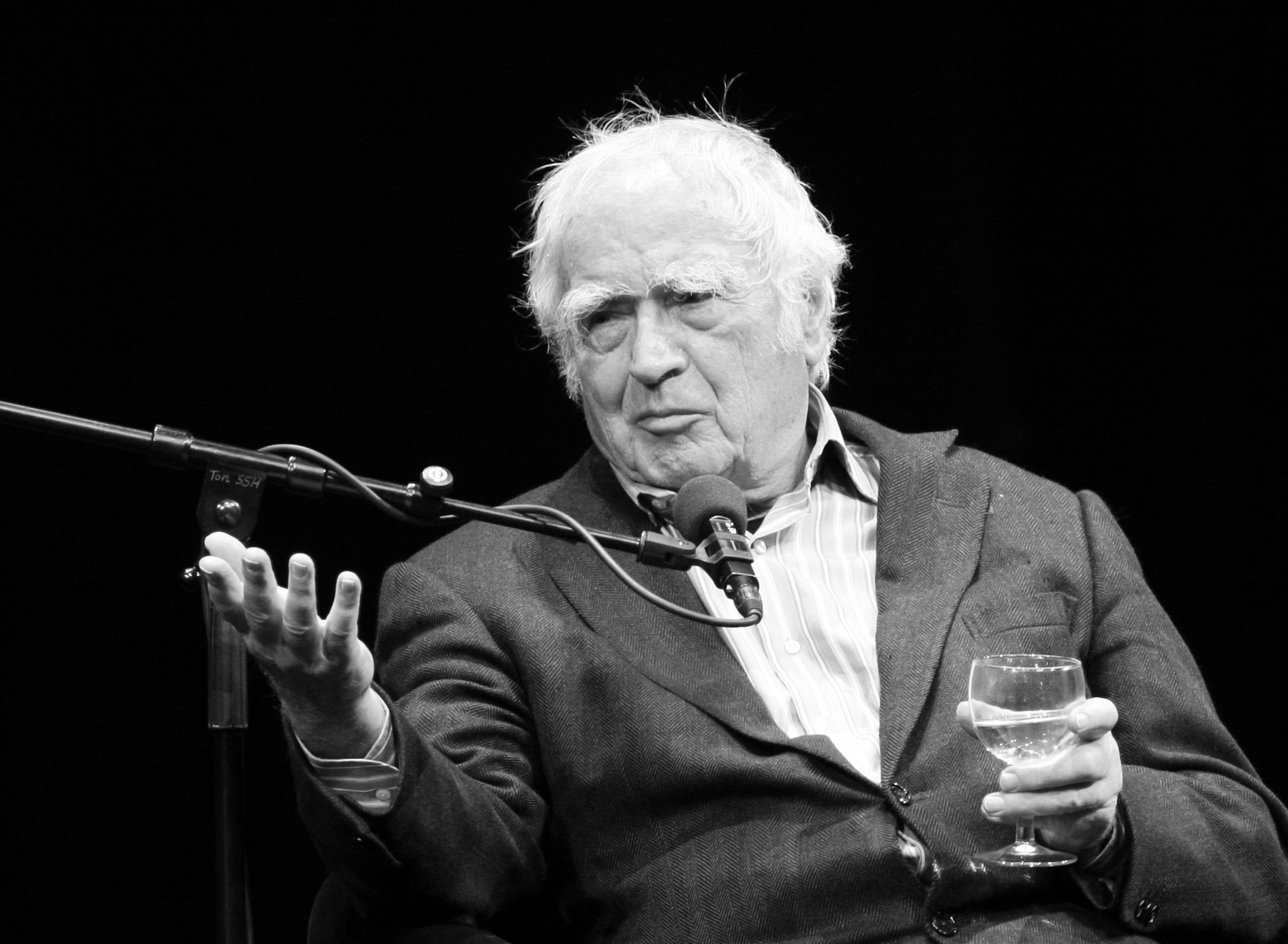 Martin Walser, deutscher Schriftsteller, während einer Lesung auf dem Literaturfestival lit.Cologne 2010